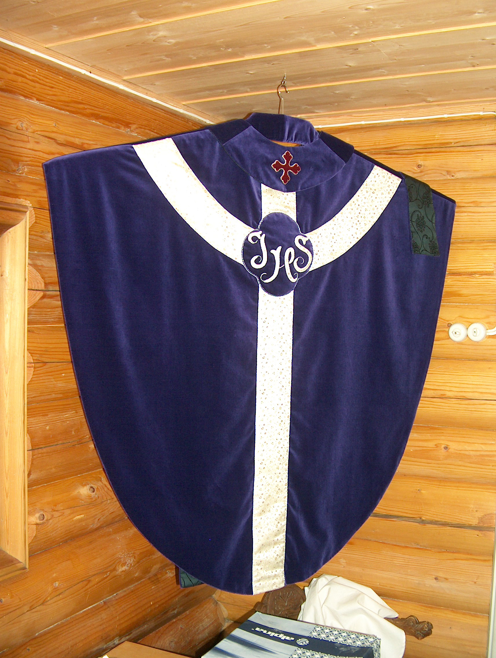 Strømsodbyda kapell, Strømsodbyda (messehagel)